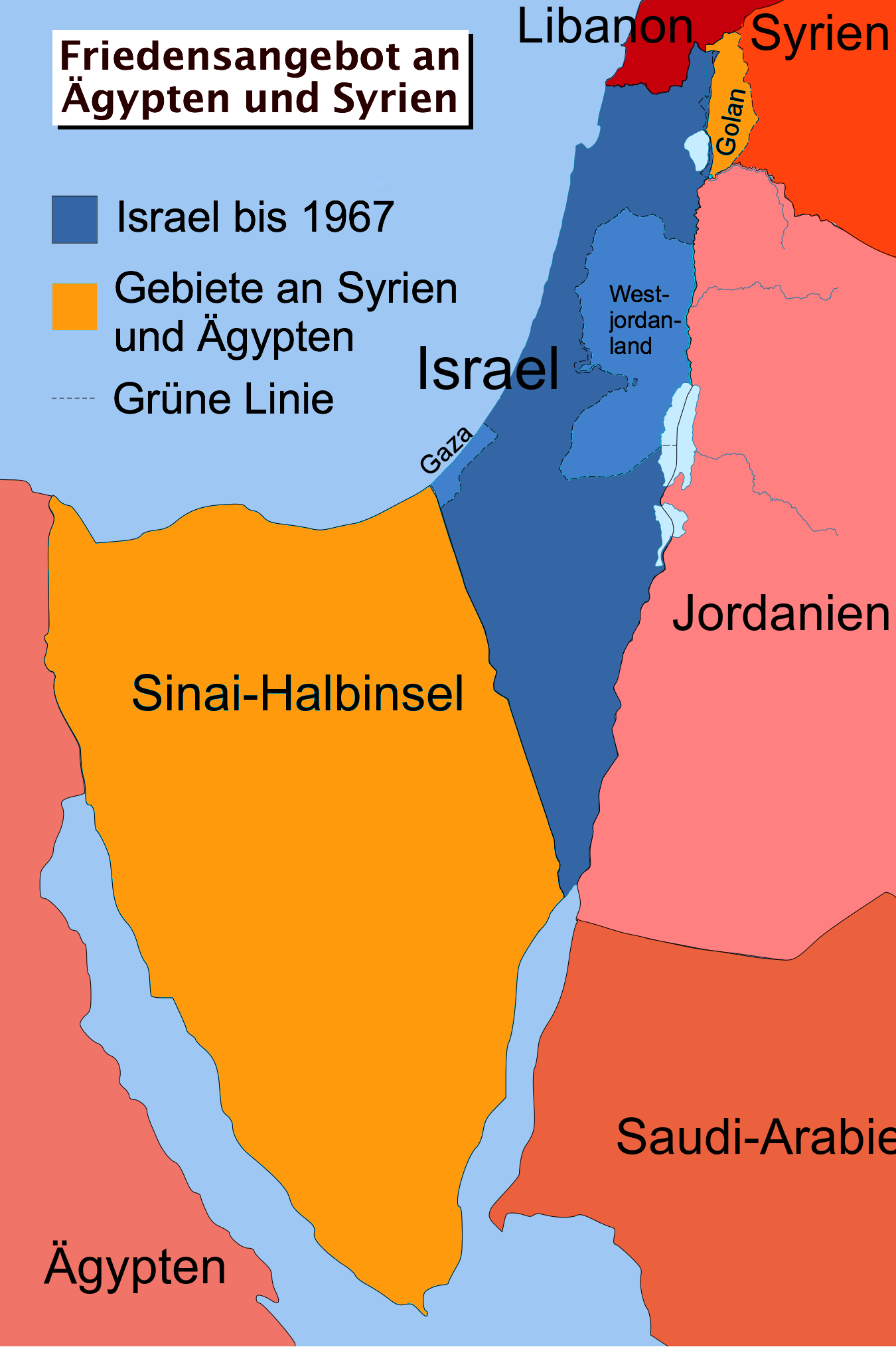 Kurz nach dem Sechstagekrieg, am 19 Juni 1967, bot die israelische Regierung ein Friedensangebot mit Syrien und Ägypten an, welche die Rückgabe der Sinai-Halbinsel und der Golanhöhen vorsah. Ägypten und Syrien lehnten jedoch Frieden mit Israel ab.